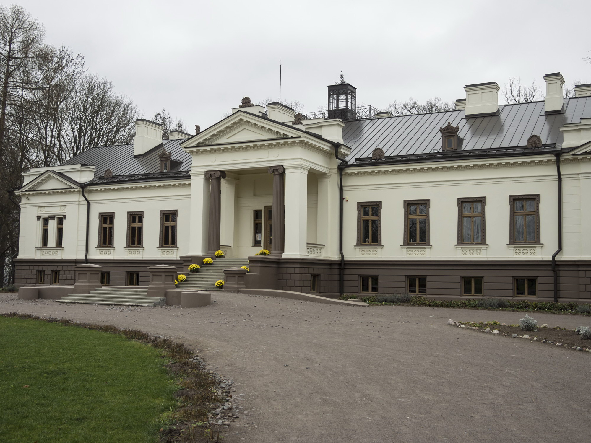 Restauruotų Gelgaudiškio dvaro rūmų pietinis fasadas